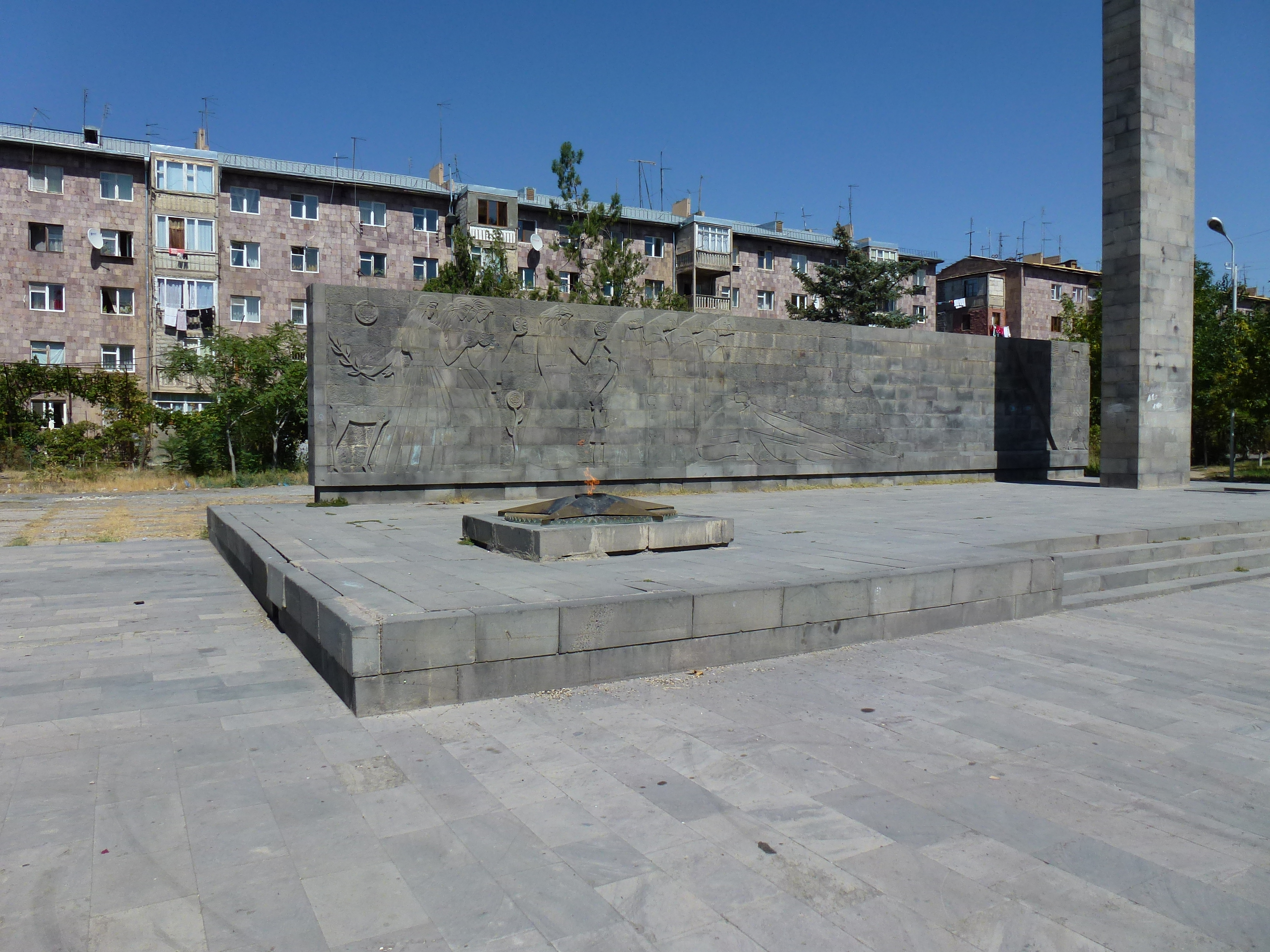 Հուշարձան երկրորդ համաշխարհային պատերազմի զոհերին, Էջմիածնում 2/21